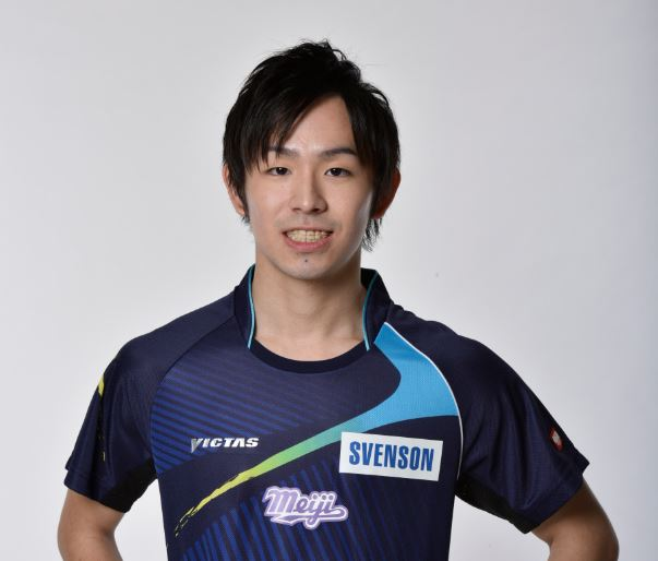 丹羽孝希